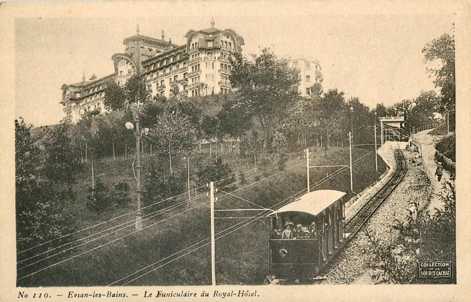 Carte postale ancienne éditée par "Collection de la Source Cachat", n°110 : Évian-les-Bains - le funiculaire du Royal-Hôtel